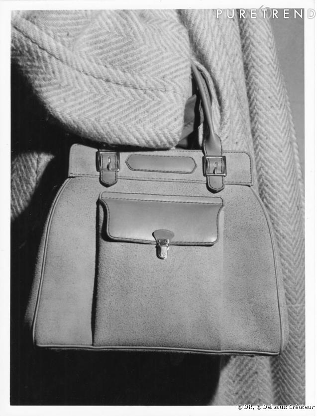 modele de 1950